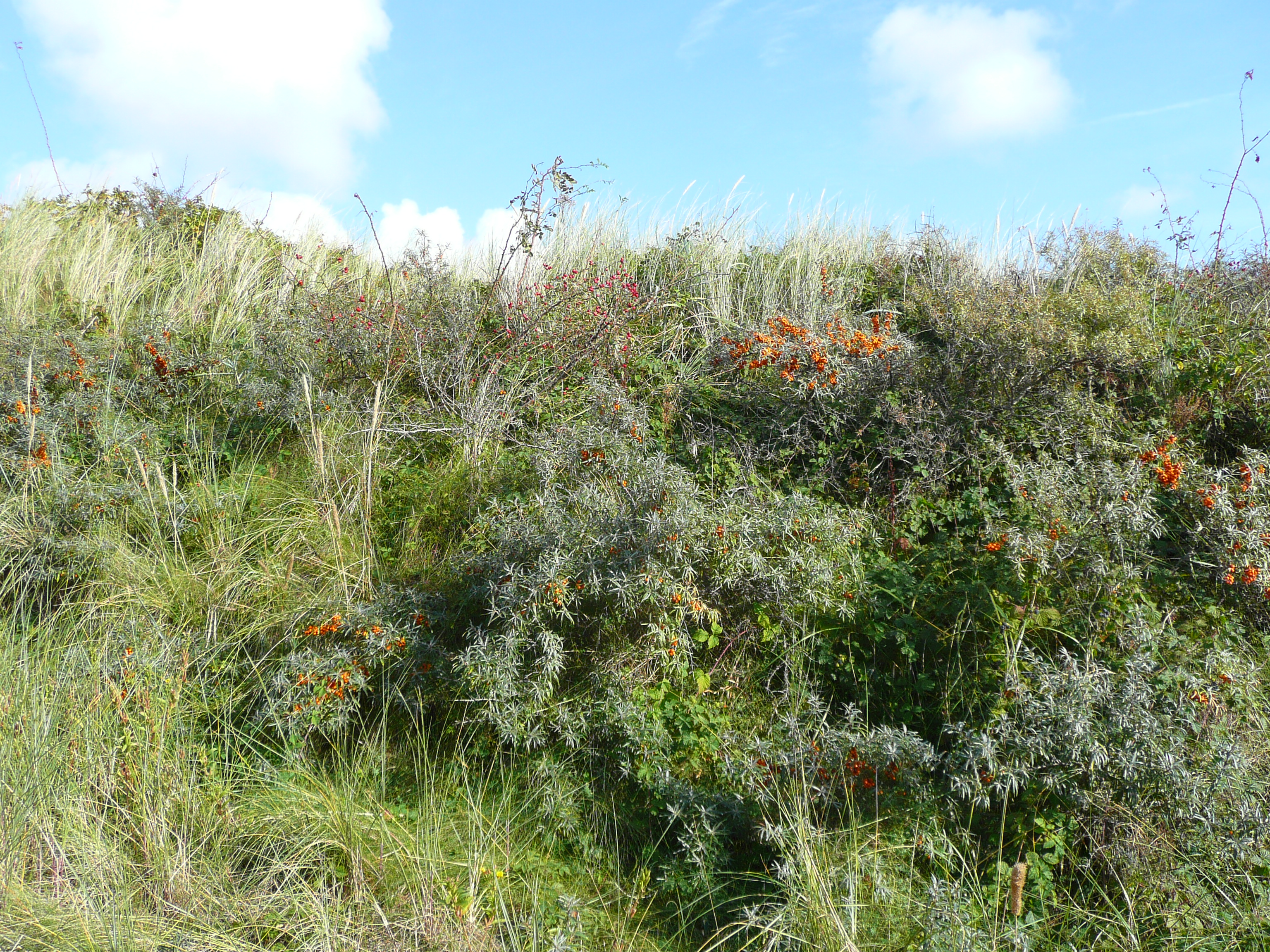 Düne auf der ostfriesischen Nordseeinsel Juist (Niedersachsen, Deutschland), bewachsen u. a. mit Sanddorn (Hippophaë rhamnoides), Hundsrose (Rosa canina)